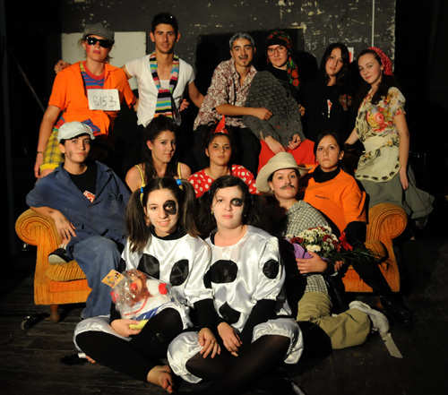 Pièce de Théâtre Une ferme en T.R.O.P d'Yves Garric jouée par un groupe de lycéens polonais en 2009.